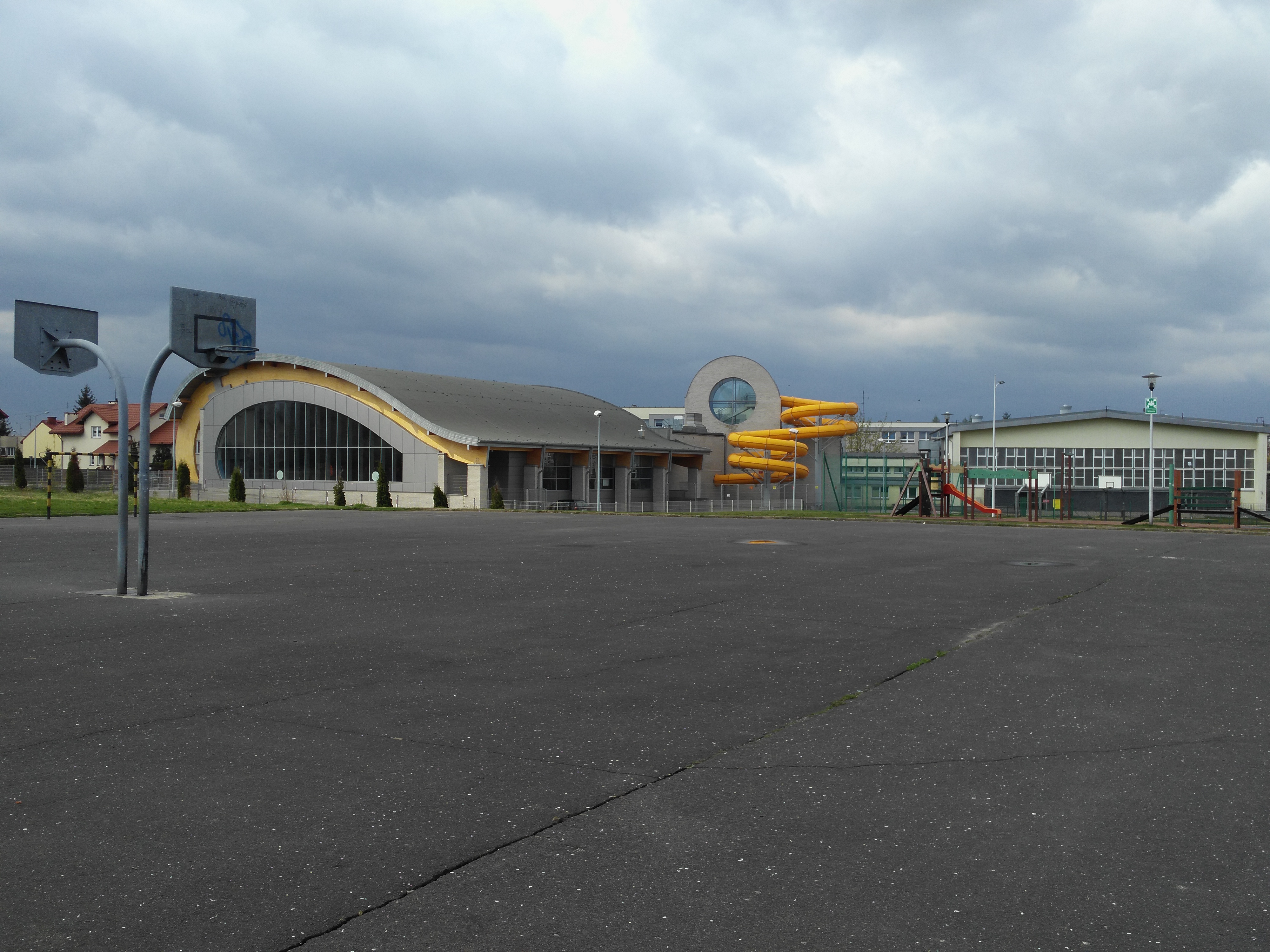 Druga tomaszowska kryta pływalnia, przy Szkole Podstawowej nr 10 na osiedlu "Niebrów" w Tomaszowie Mazowieckim